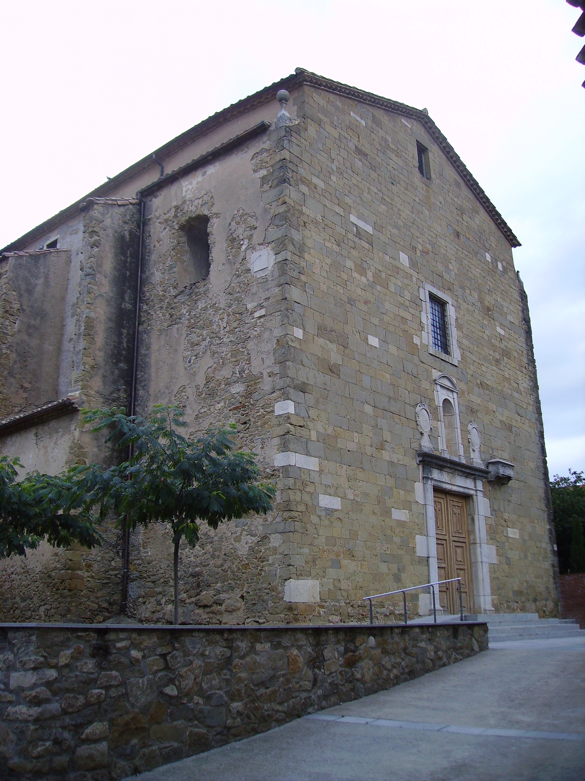 Església de Sant Jordi Desvalls, Gironès, Catalunya.